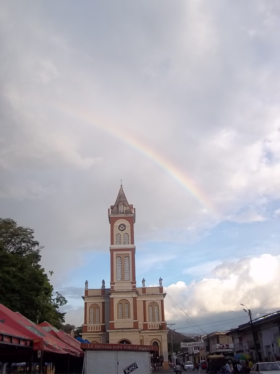 Iglesia ubicada en la cra 5 con calle 5 en la plaza principal de Bugalagrande valle